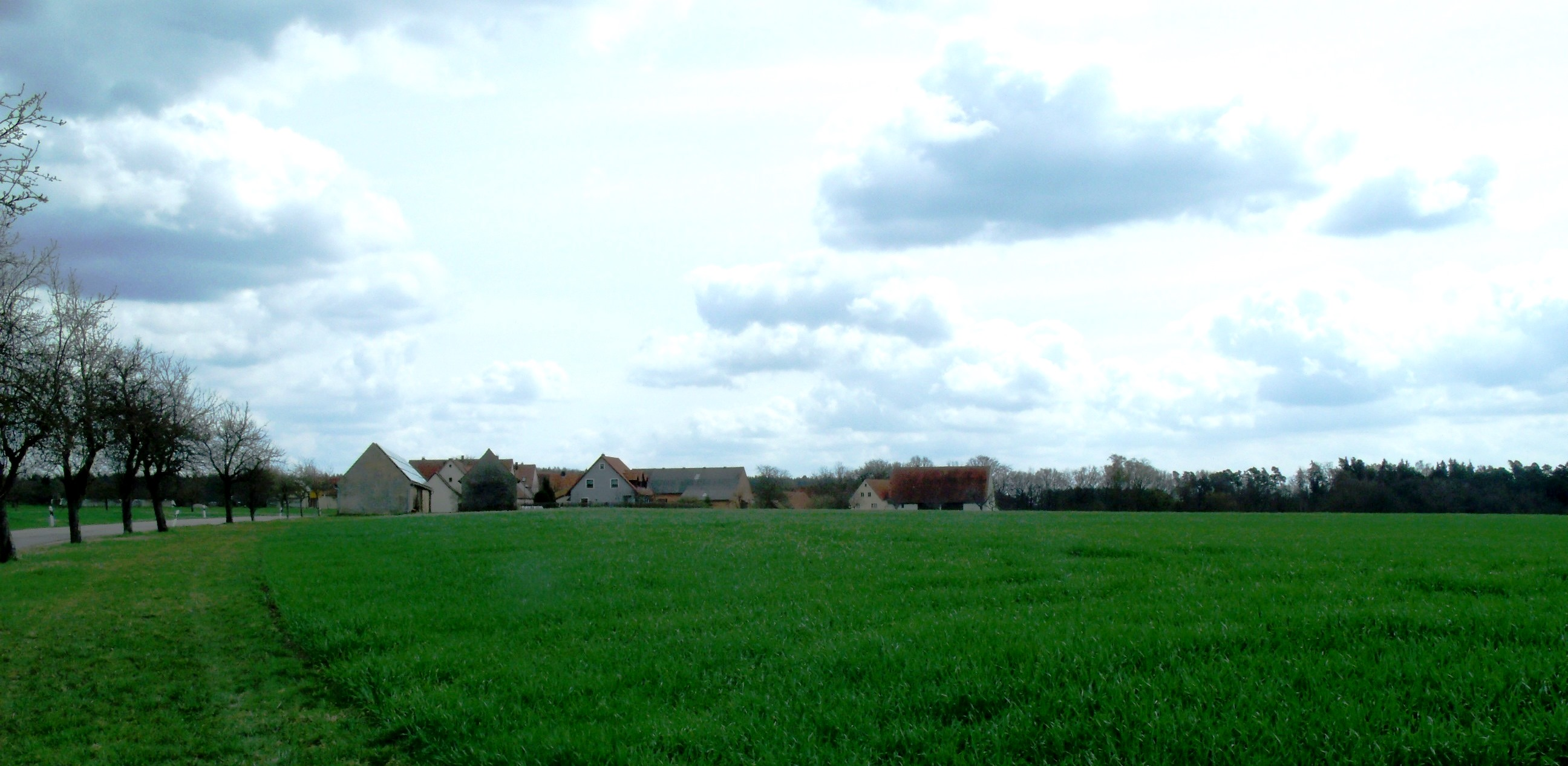 Tiefenthal (Ortsteil von Leutershausen)